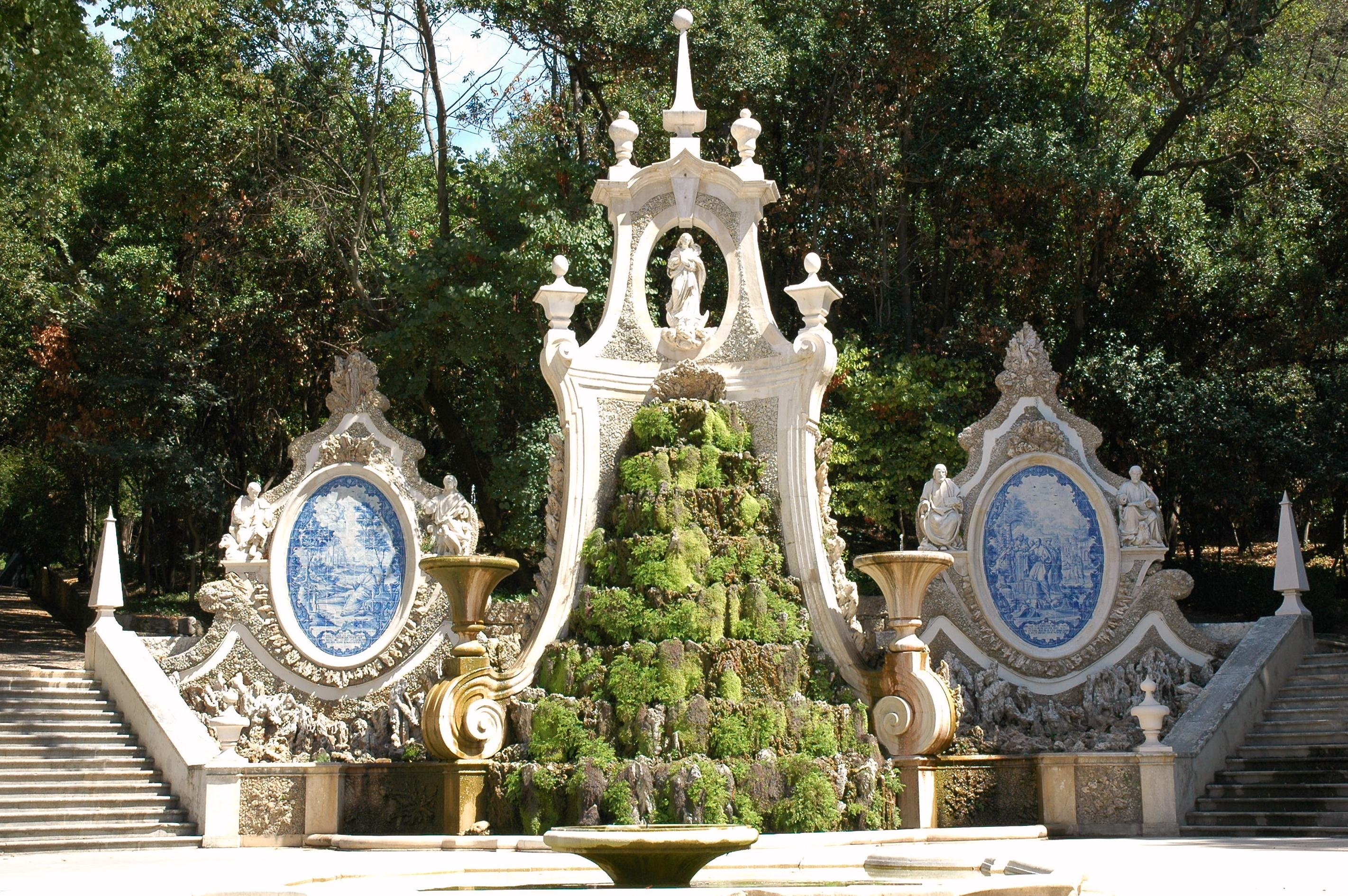 Jardim da Sereia, cascata de 3 corpos, Coimbra, Portugal